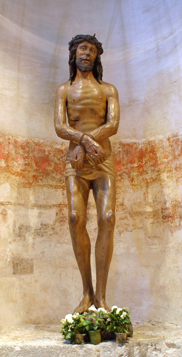 Groß St. Martin, Köln. Schmerzensmann (Ecce Homo), Anfang 16. Jh.